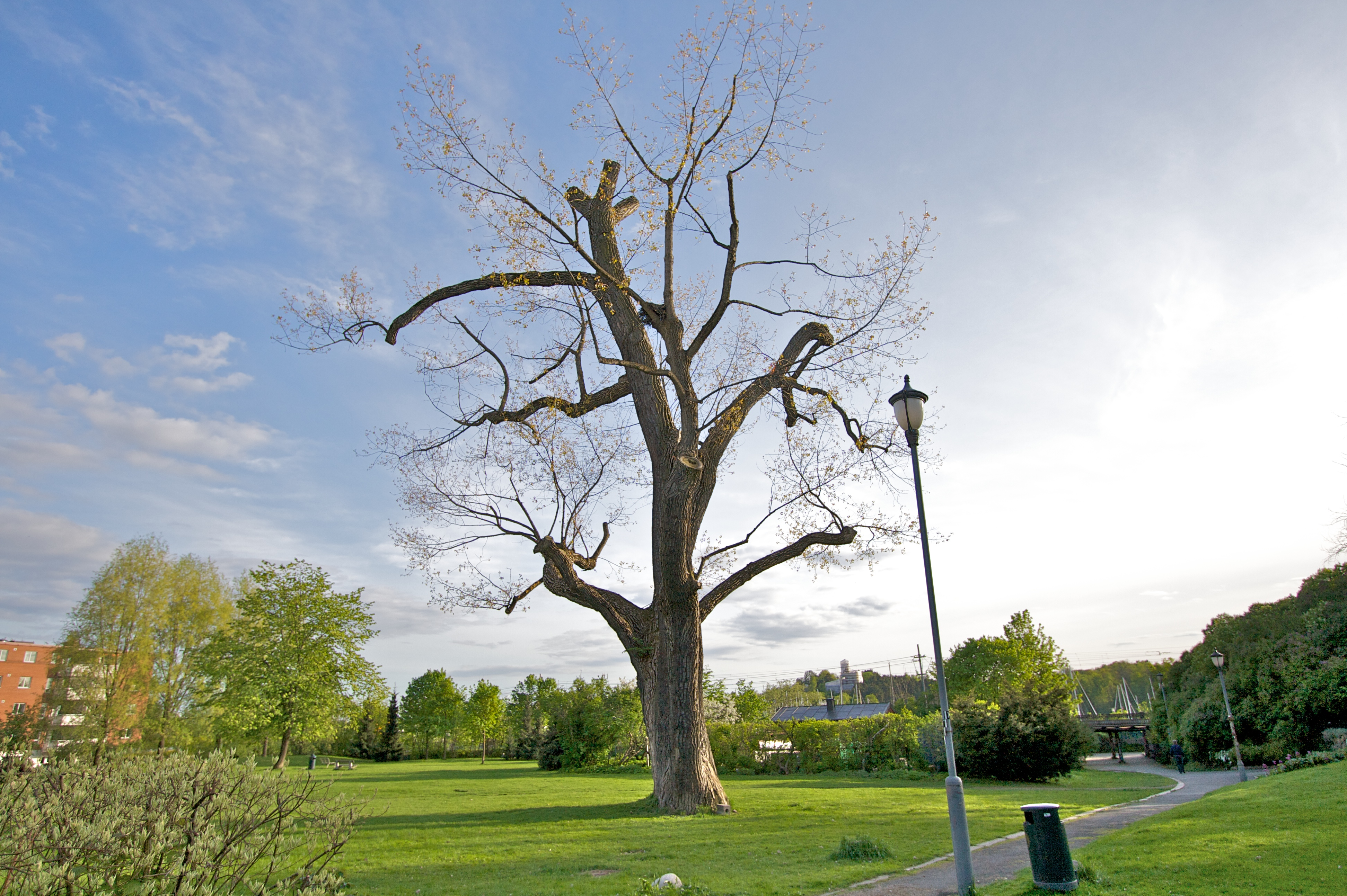 Poppeltreet i Skarpsnoparken.